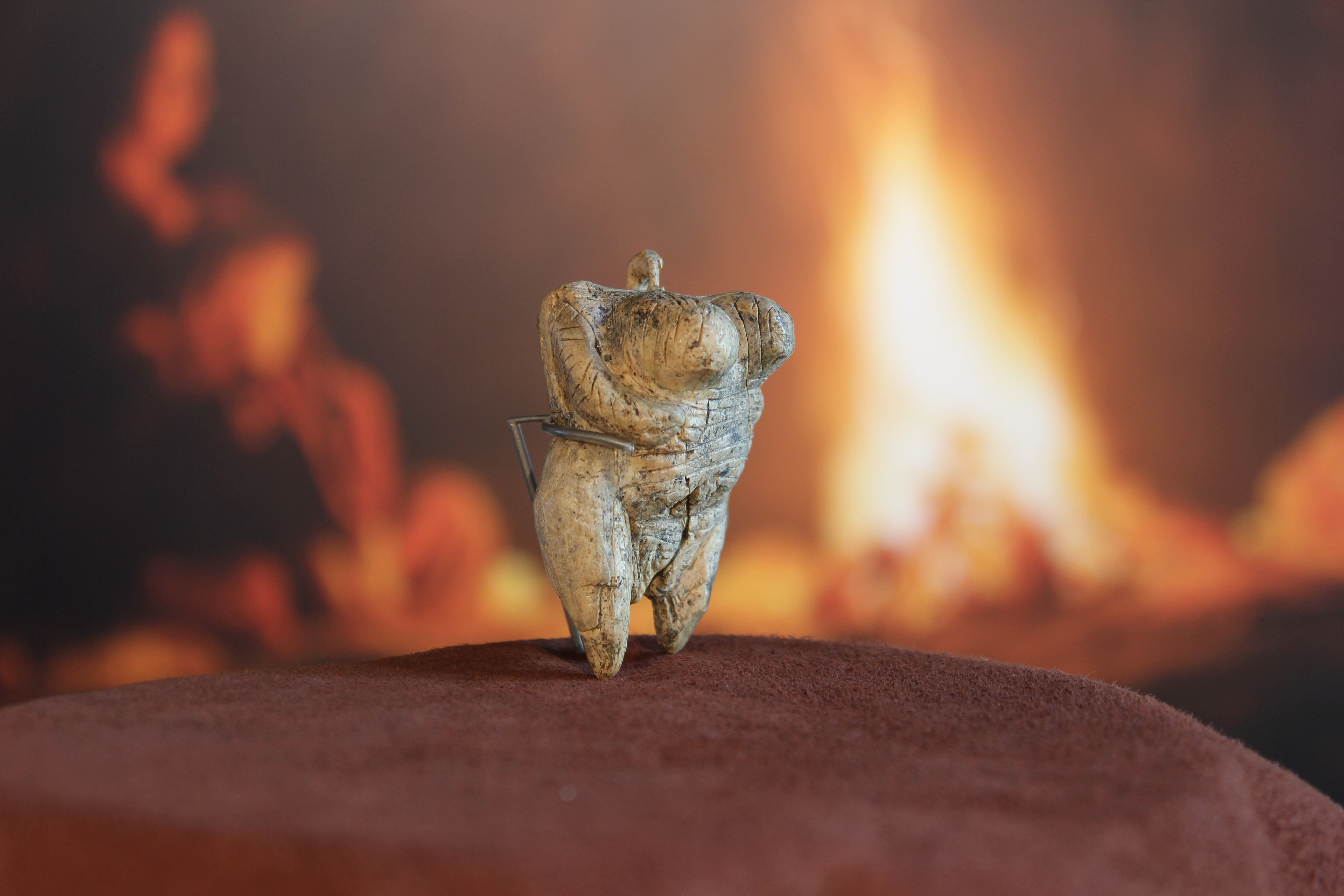 Seit 2014 ist die Venus vom Hohle Fels ein Anziehungspunkt des Urgeschichtlichen Museums. Die etwa sechs Zentimeter hohe, aus Mammut-Elfenbein geschnitzte Venusfigurine, die im September 2008 im Hohle Fels bei Schelklingen entdeckt wurde, ist mit ihrem Alter von etwa bis 40 000 Jahren die älteste Frauendarstellung weltweit.